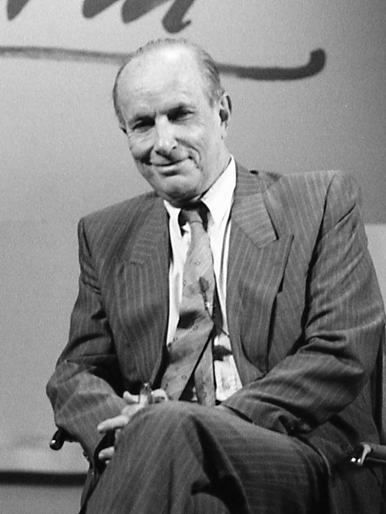 Nils Petter Sundgren.